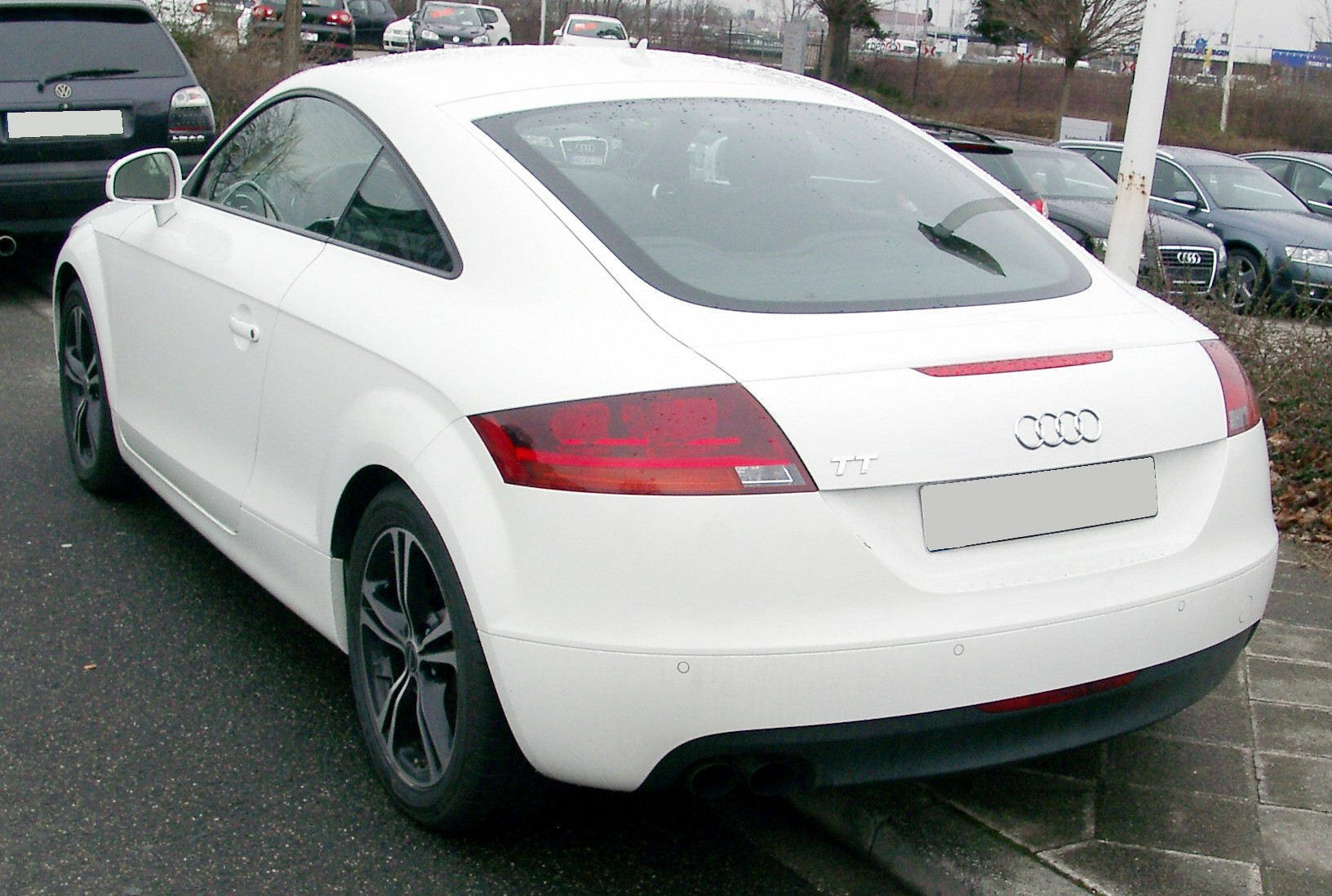 Audi TT, 2. Generation